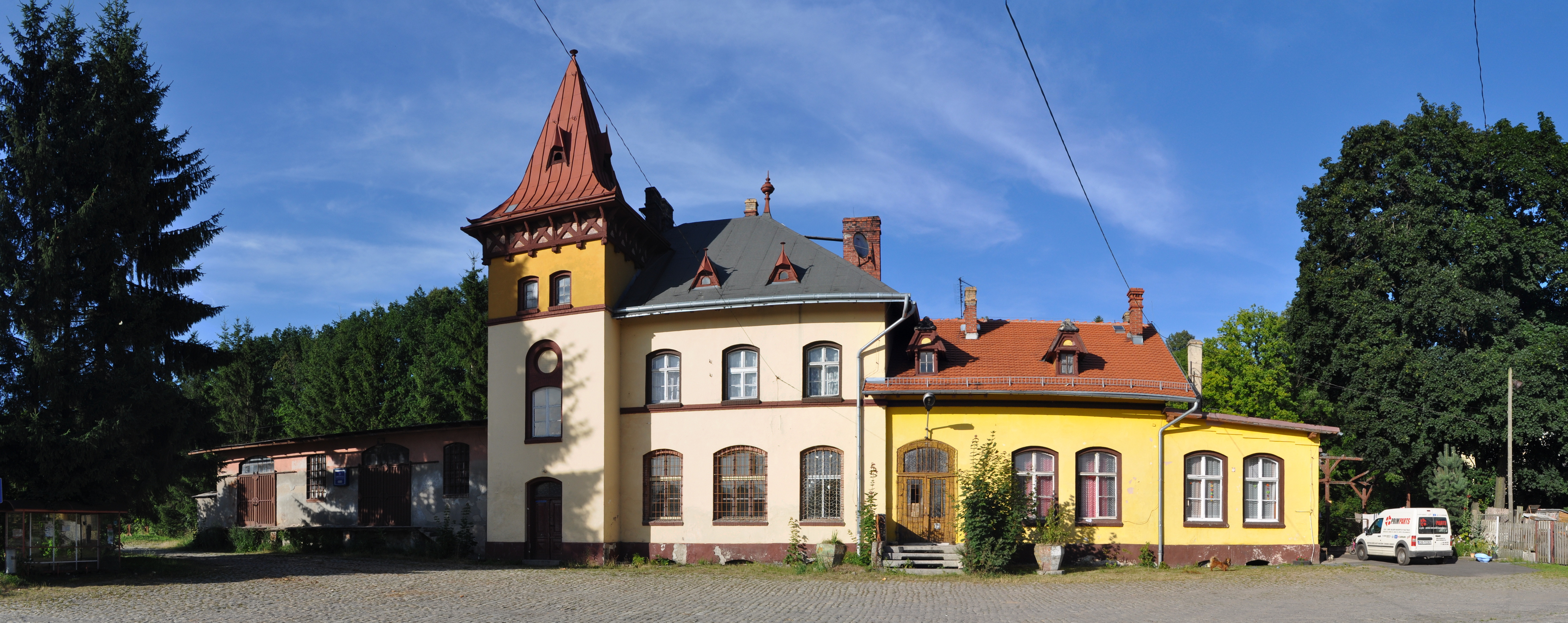 Świerzawa - stacja kolejowa